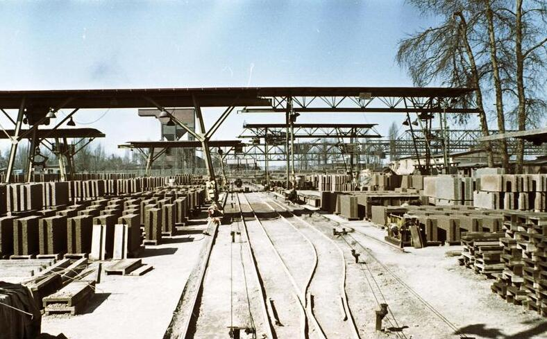 Rummelsburg, Betonwerk Betonwerk Rummelsburg Gesamtüberblick [Rummelsburg.- Gesamtansicht des Betonwerks]